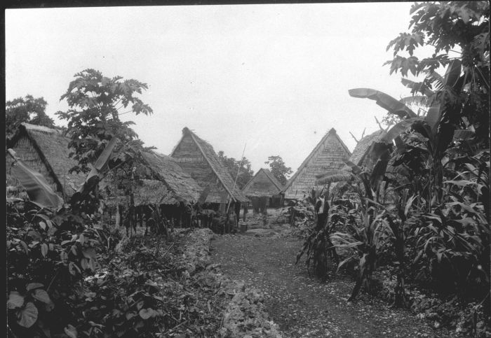 Foto. Woningen in een kampong op het eiland Larat in de Tanimbar archipel van de Molukken